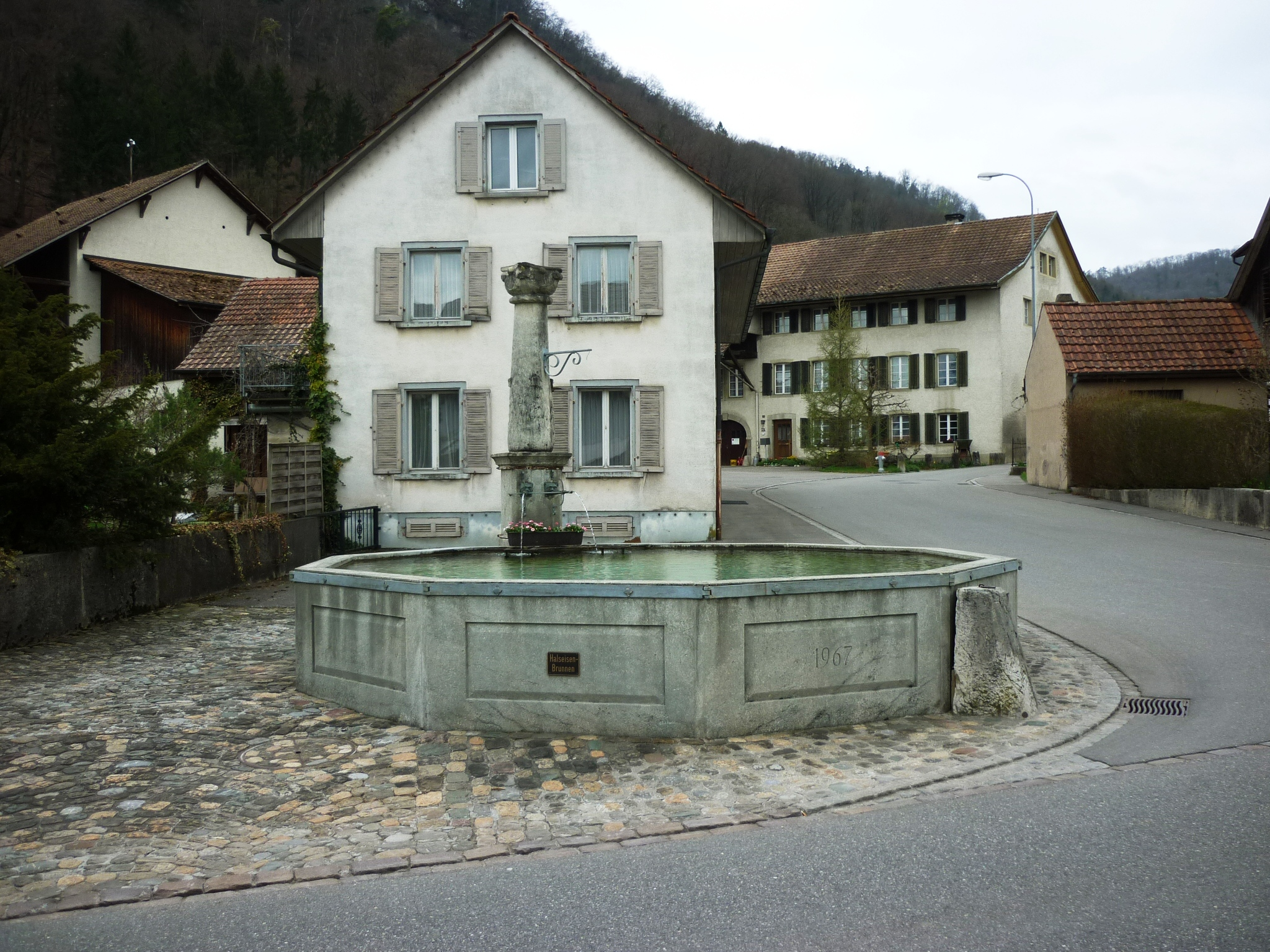 Halseisenbrunnen, Villigen AG, Schweiz